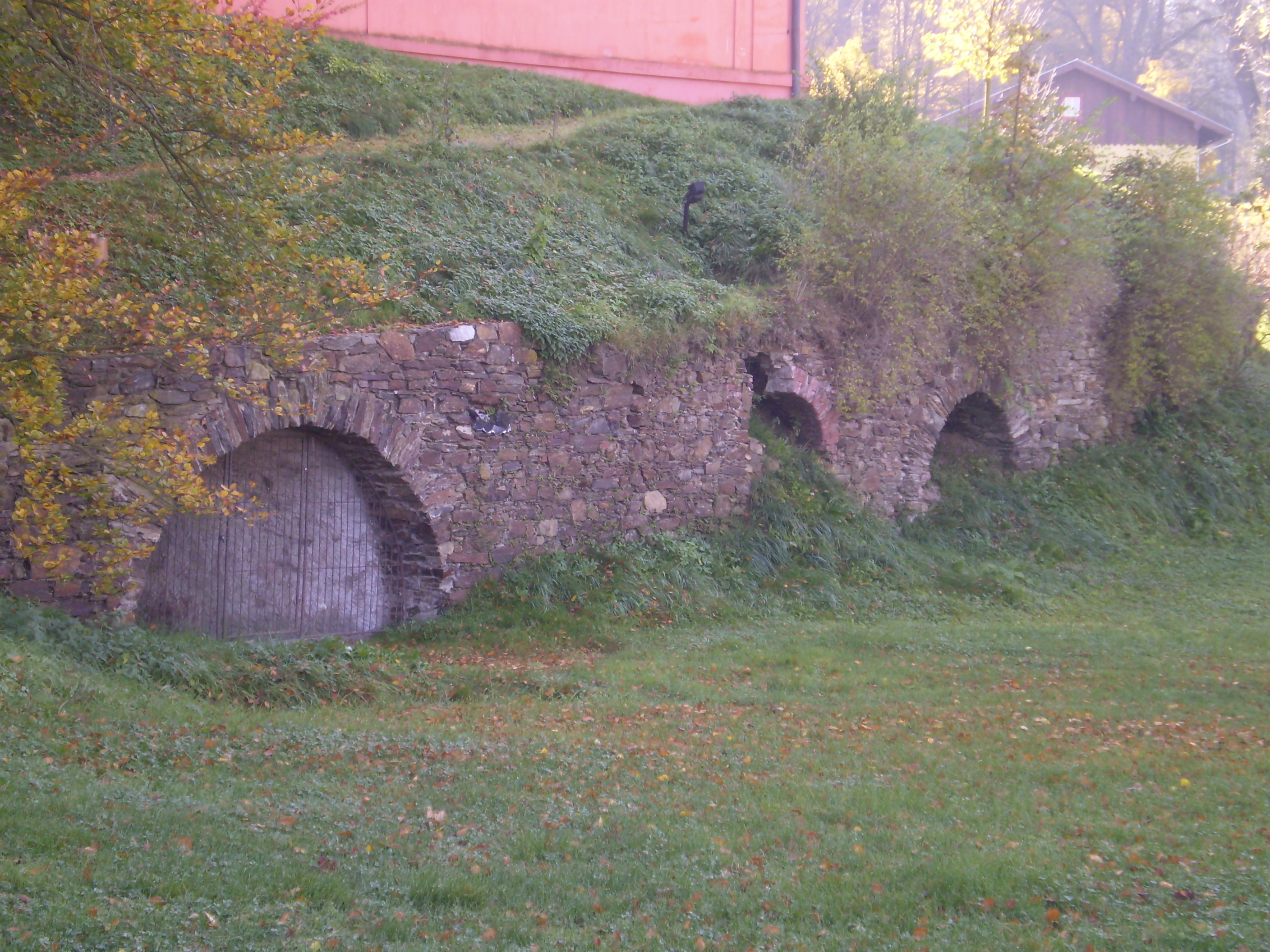 pivovarské sklepy, poslední pozůstatek po luckém pivovaru